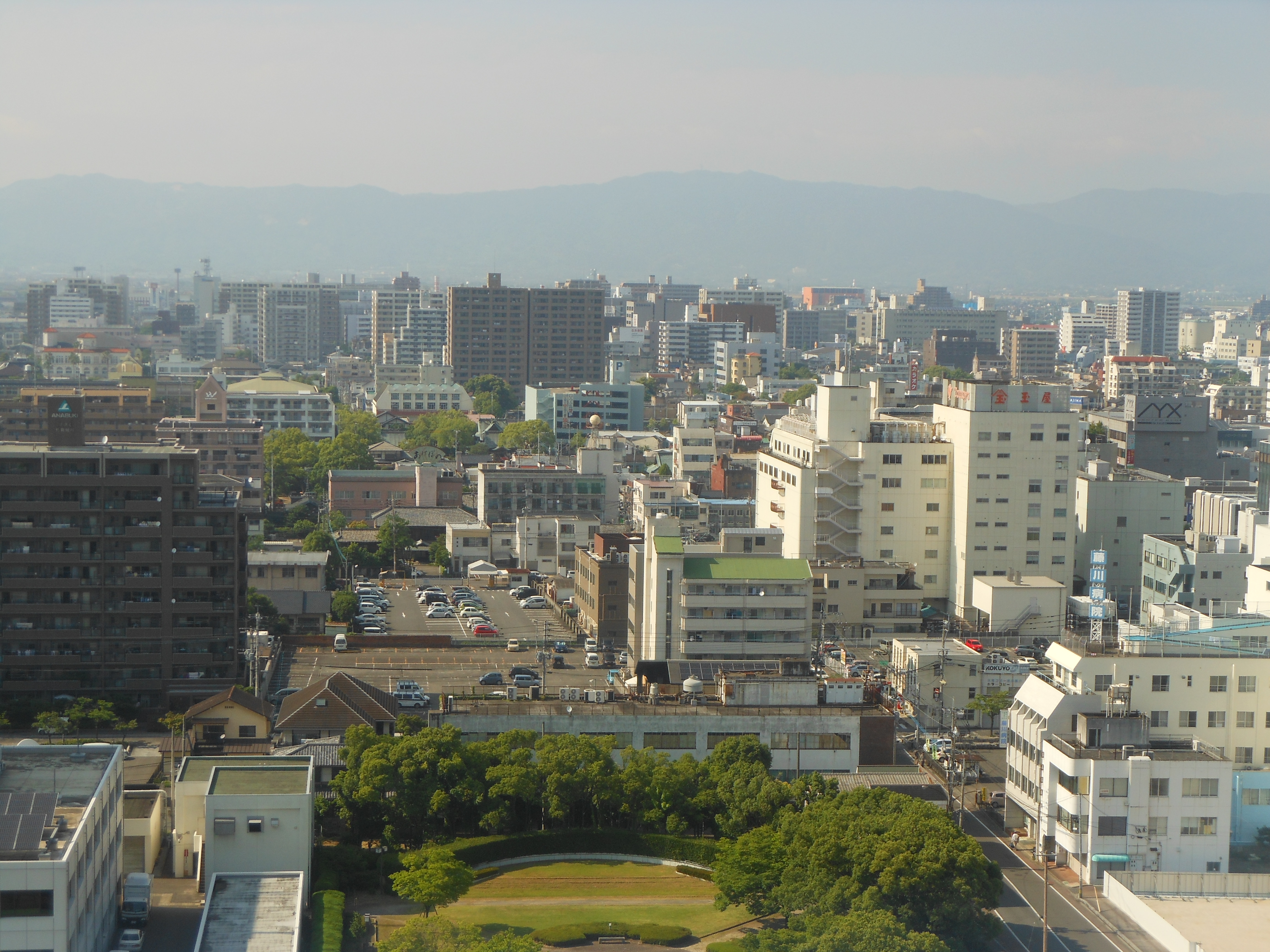 佐賀市中心部の遠景を拡大。佐賀県庁屋上展望台より北側、中央大通り・佐賀駅方向を望む。写真右側の建物が佐賀玉屋。写真中央が佐賀駅方面。